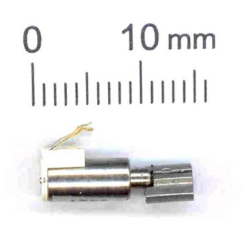 Motor mit Unwucht aus einem Mobiltelefon